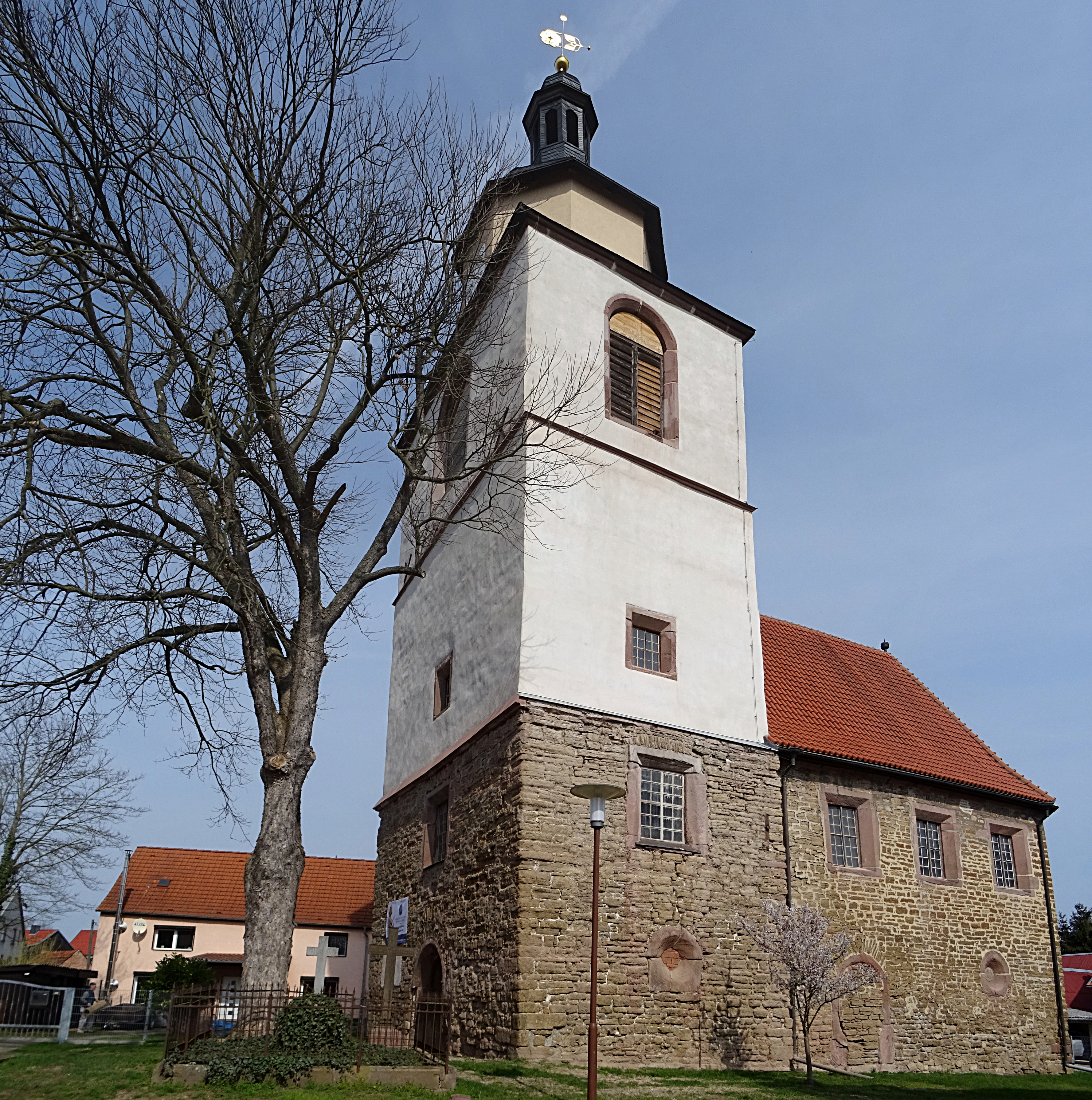 Kirche St. Philippus (1575) in Kleinwerther mit 35 m hohem Turm